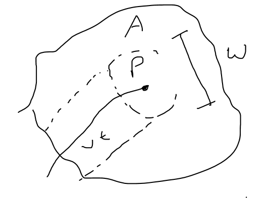 Equazione di Nicholson–Bailey, schema per derivare l'equazione.